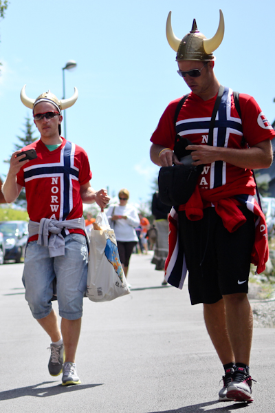 Norvège